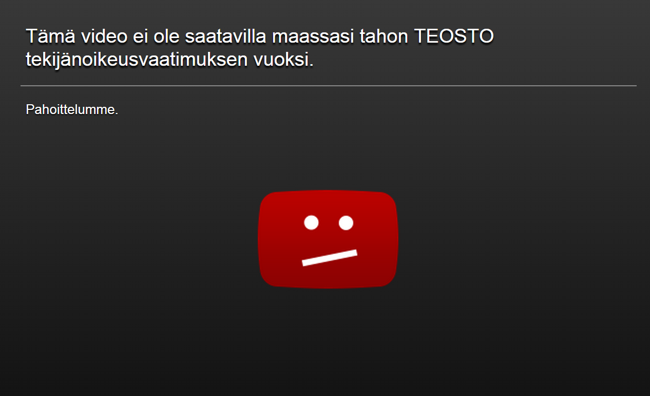 "Tämä video ei ole saatavilla maassasi tahon TEOSTO tekijänoikeusvaatimuksen vuoksi. "